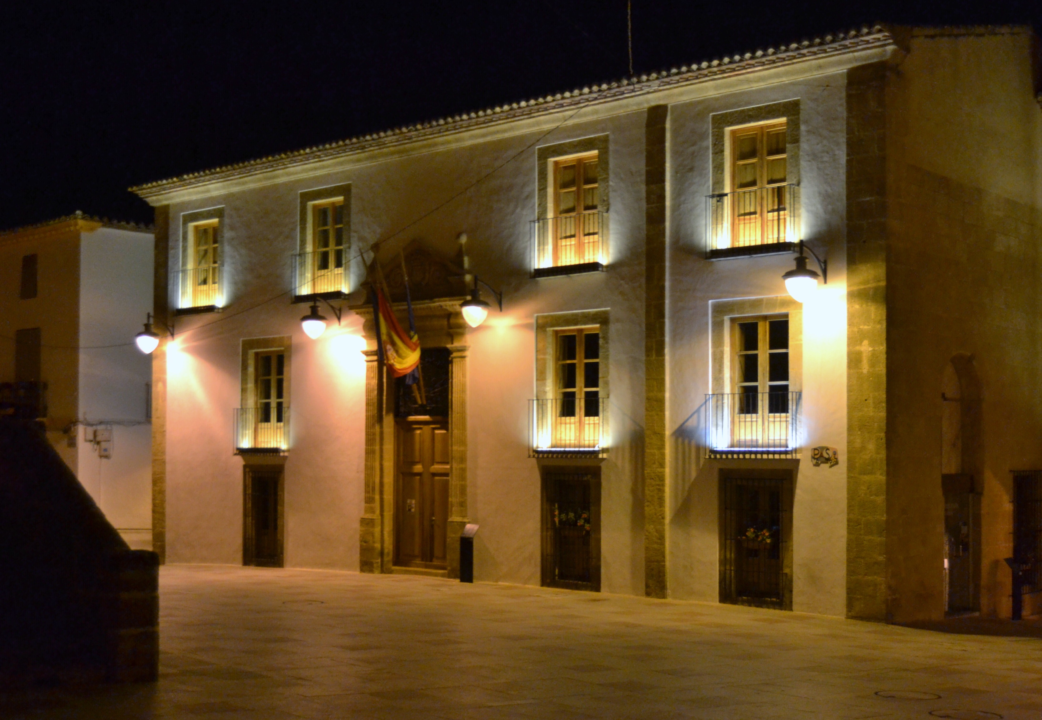 Ajuntament de Xàbia de nit.